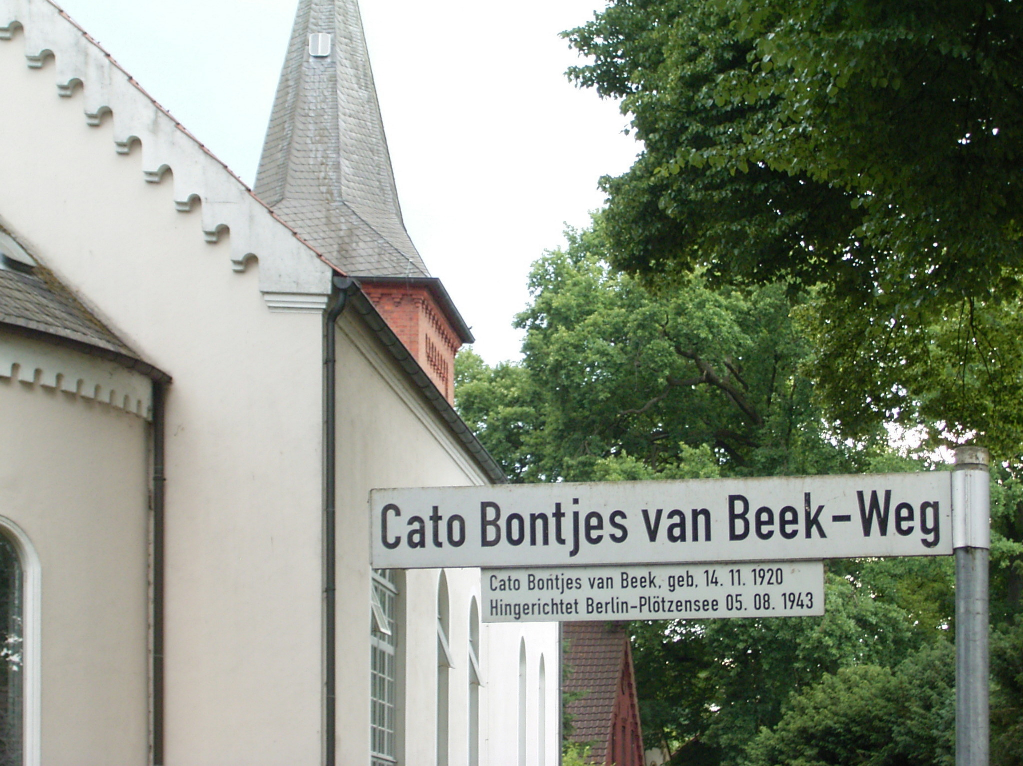 Straßenschild Cato Bontjes van Beek-Weg vor der Liebfrauenkirche Fischerhude.